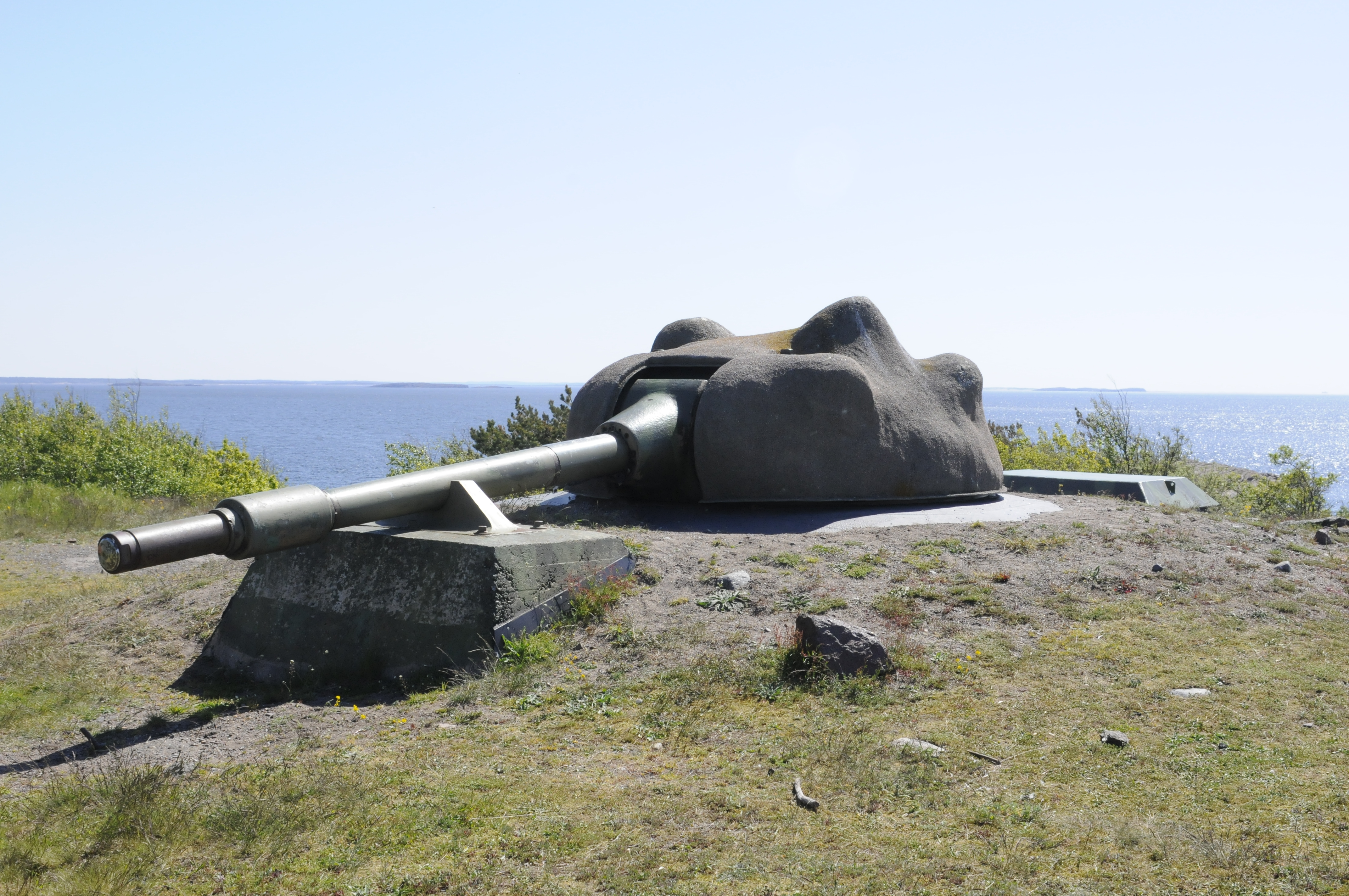 Bolærne fort - Observasjonspost